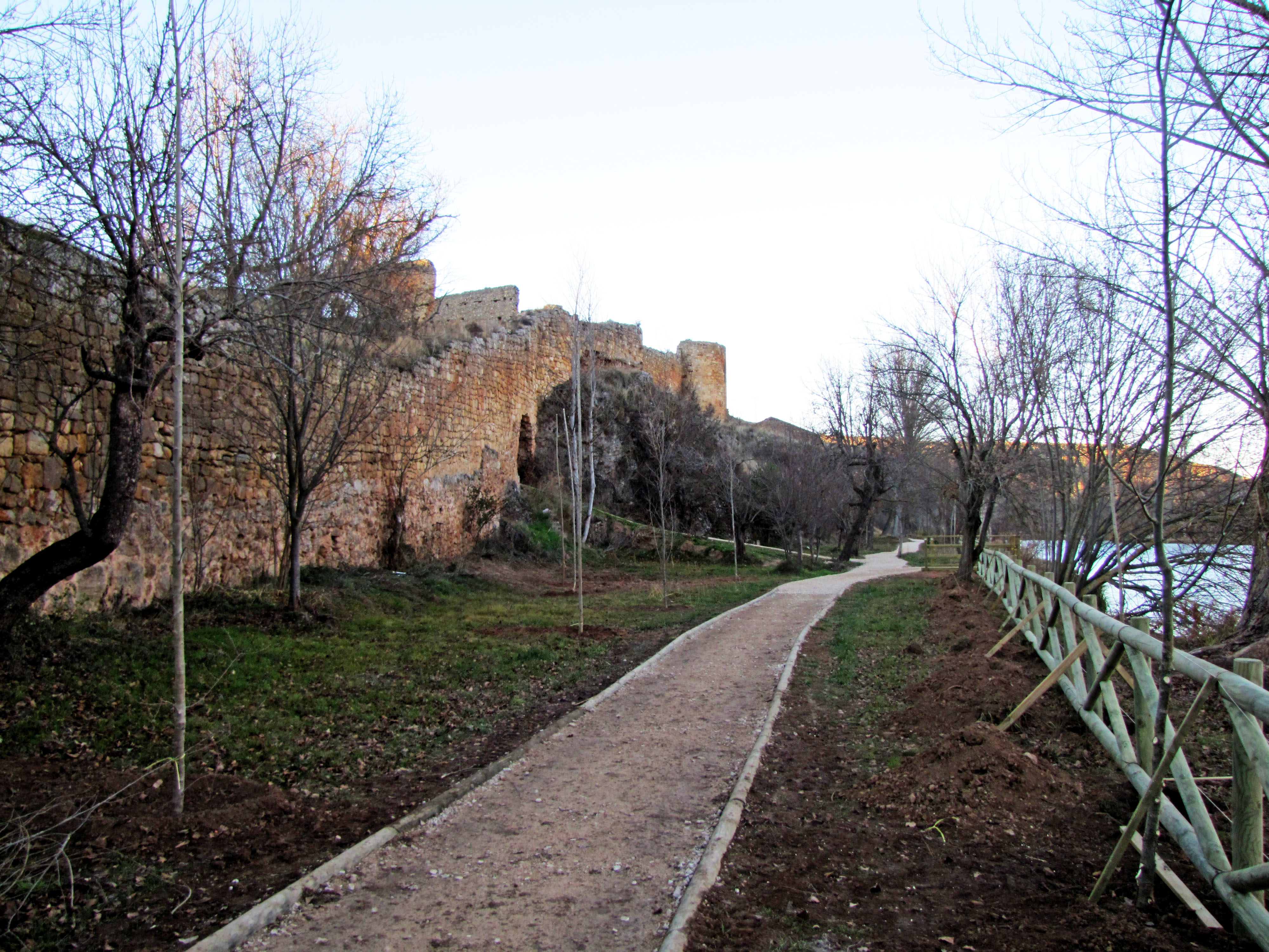 Muralla de Soria. Paño que discurre junto al río Duero aguas arriba del Puente de Piedra.